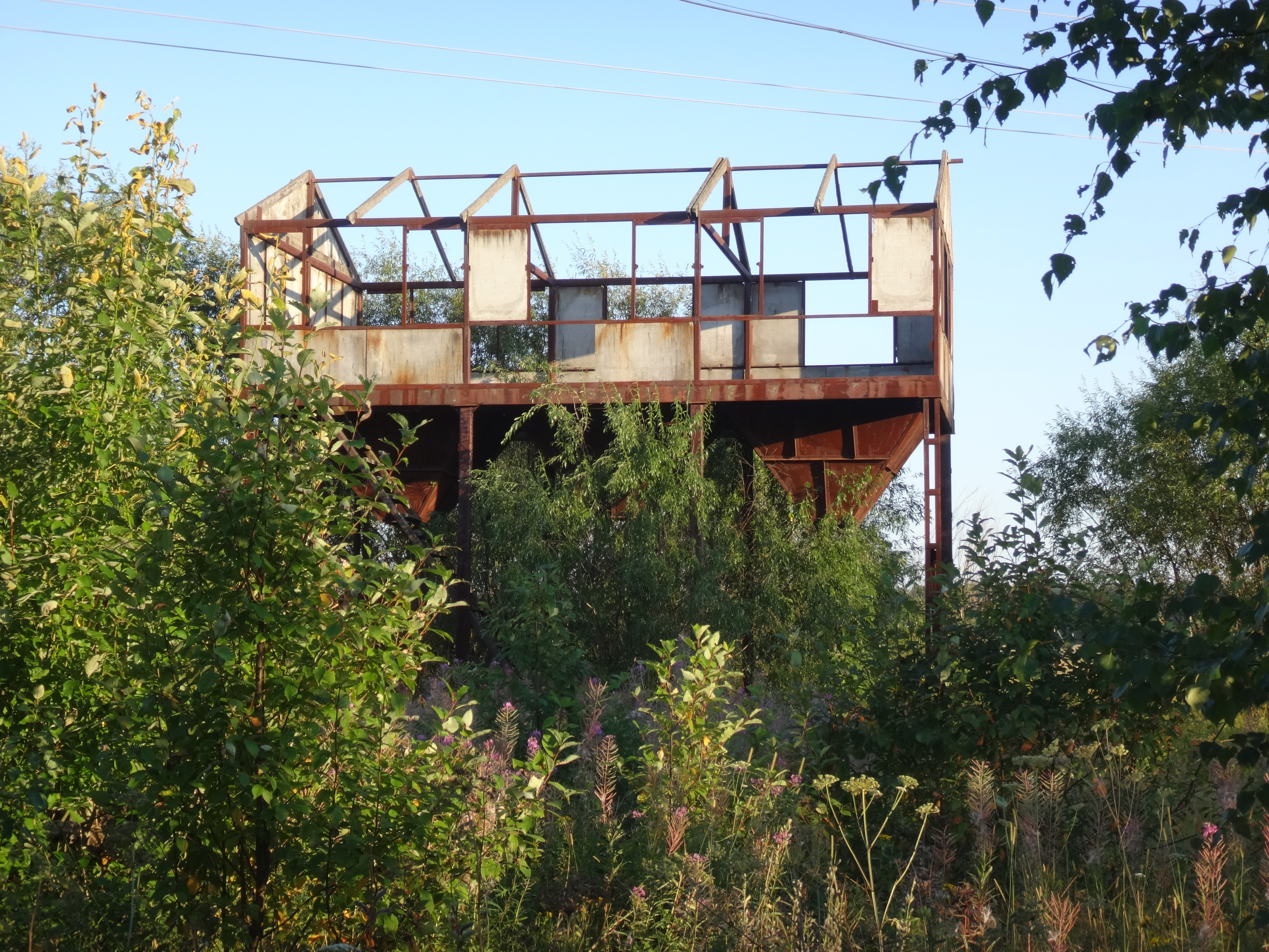 Бункер в Слудах